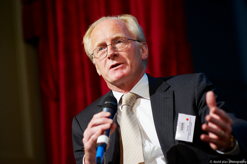 Kai Eide